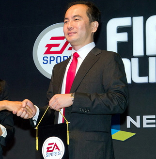 넥슨-EA코리아 'FIFA 온라인 3' 평가전 이벤트 (서민)